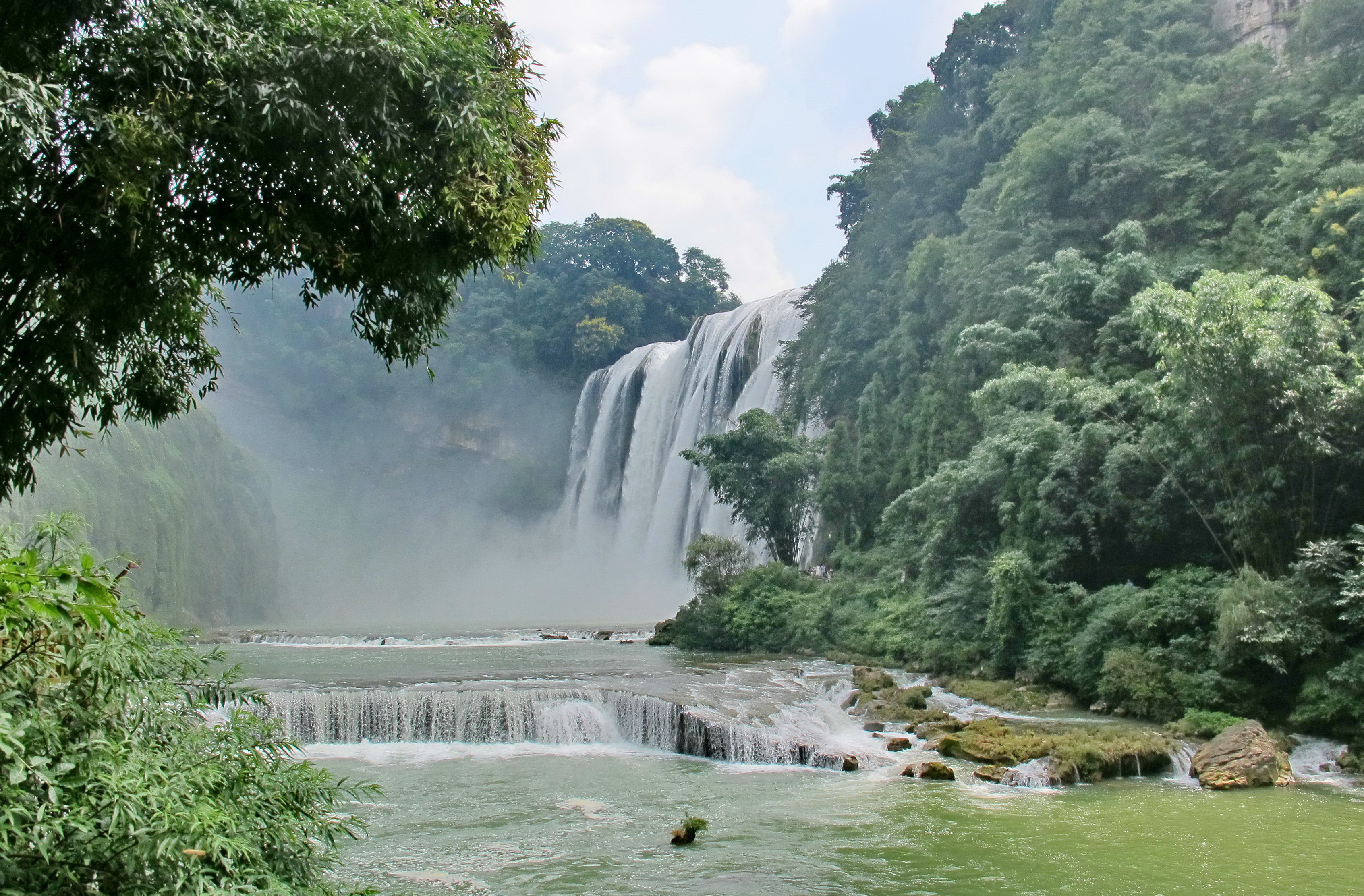 贵州 黄果树瀑布